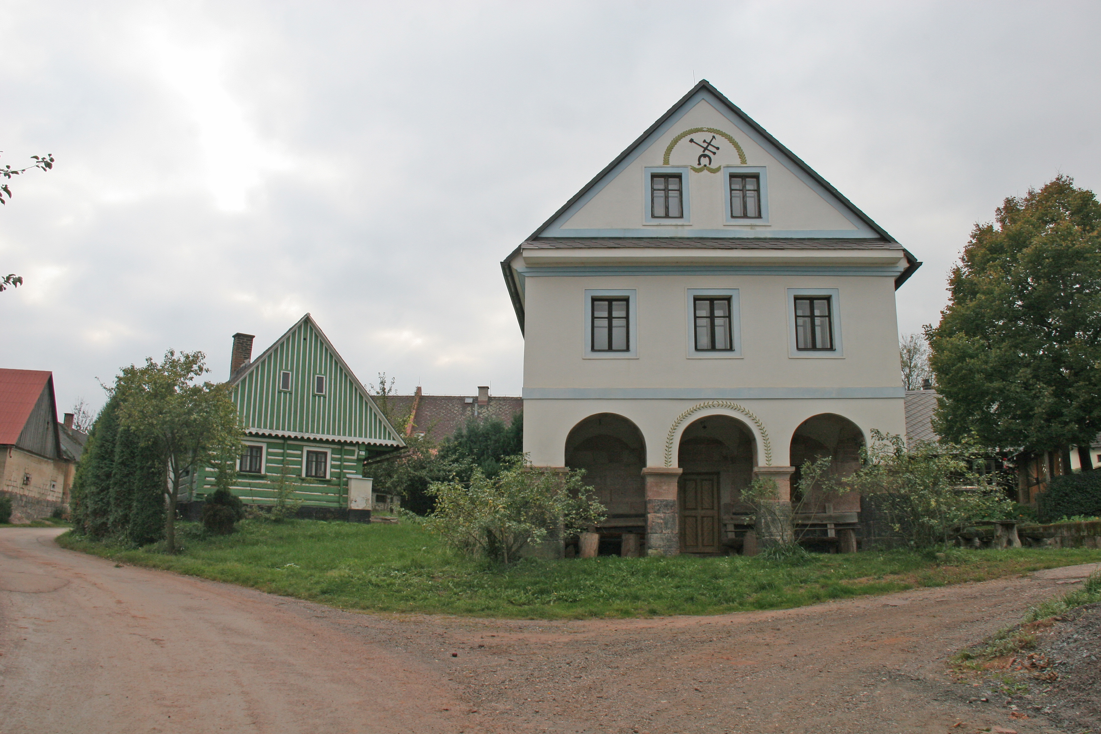 Kovárna, Kal 49.